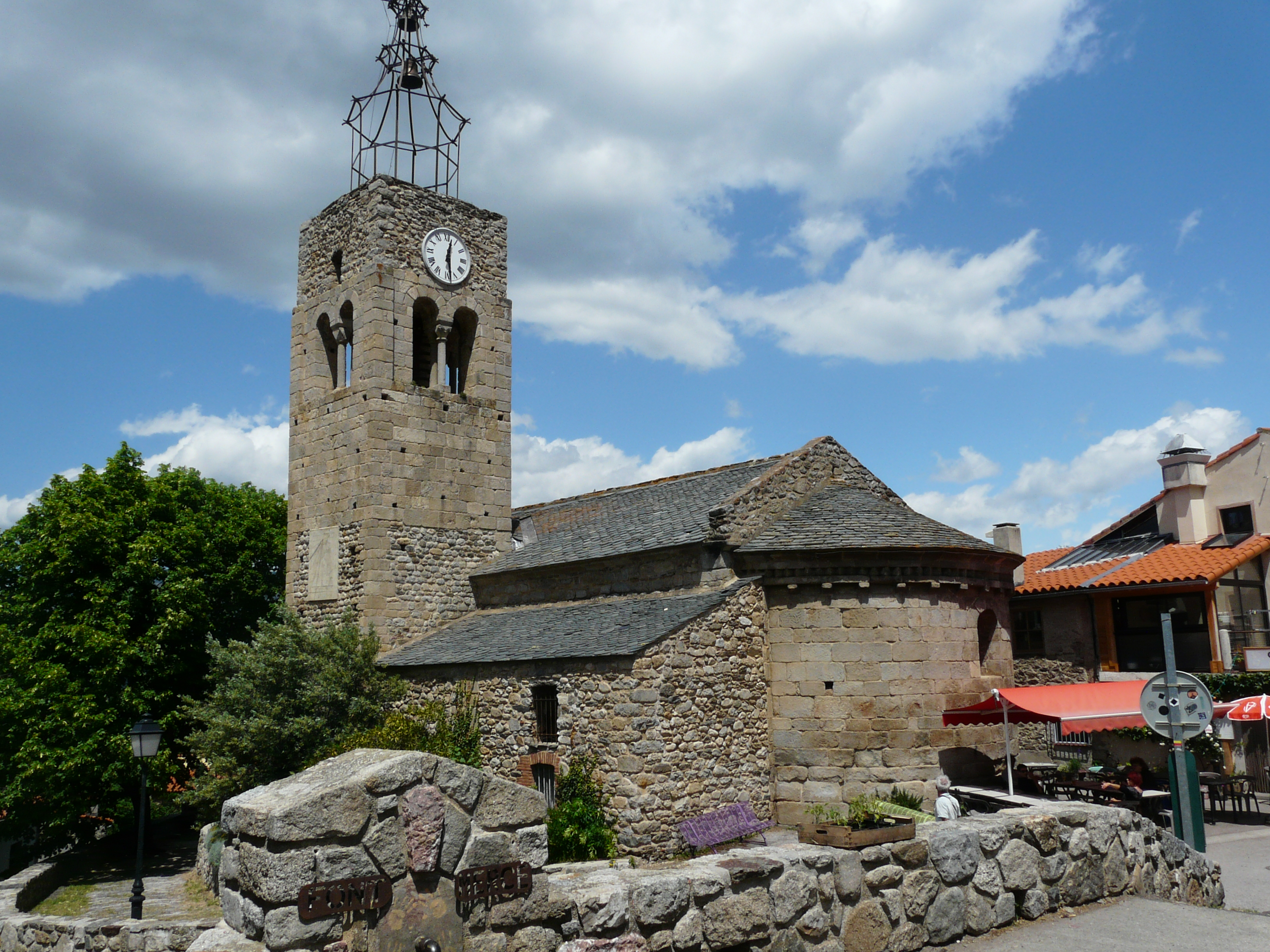 L'església, des del sud-est